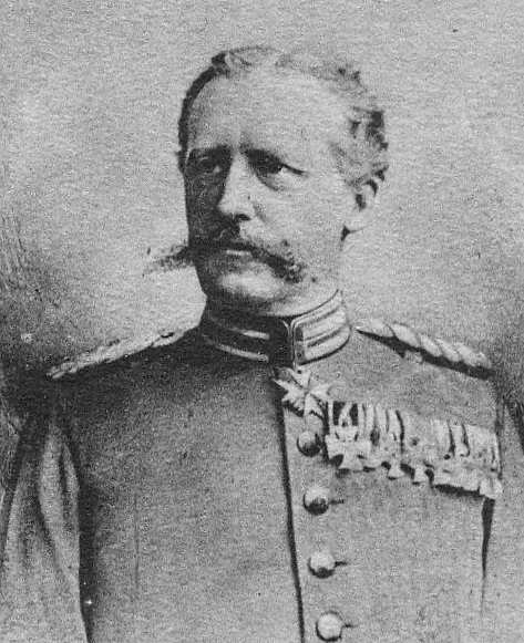 Kommandeur Ulanen-Regiment "Großherzog Friedrich von Baden" (Rheinisches) Nr. 7